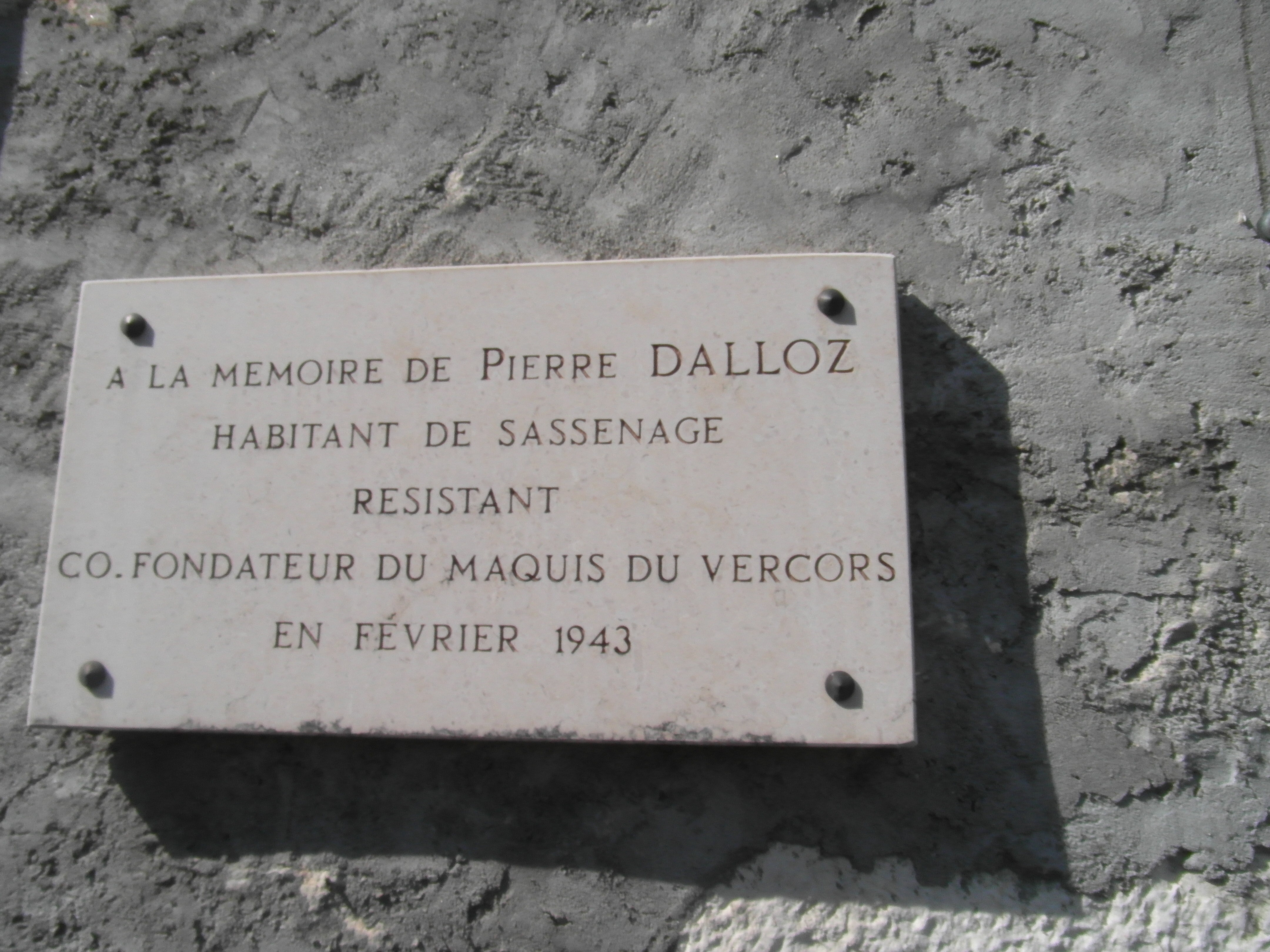 Plaque commémorative Dalloz à Sassenage